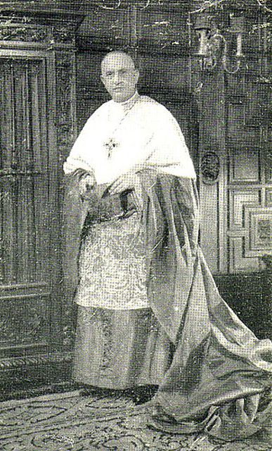 Leopoldo Eijo y Garay